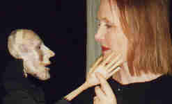 Figurteater " Forbrytelse og straff " Dostojevskij , Dukkoppteatret